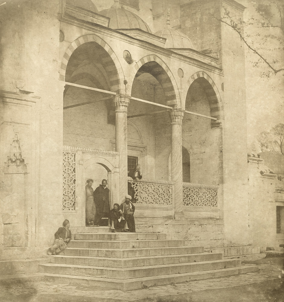 Süleymaniye Mosque, Constantinople. Circa 1853. Salt print. 27,6 x 26,3 cm.